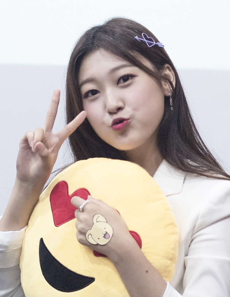 2017 08 05 이달의소녀 최리 진솔 홍대 팬싸인회